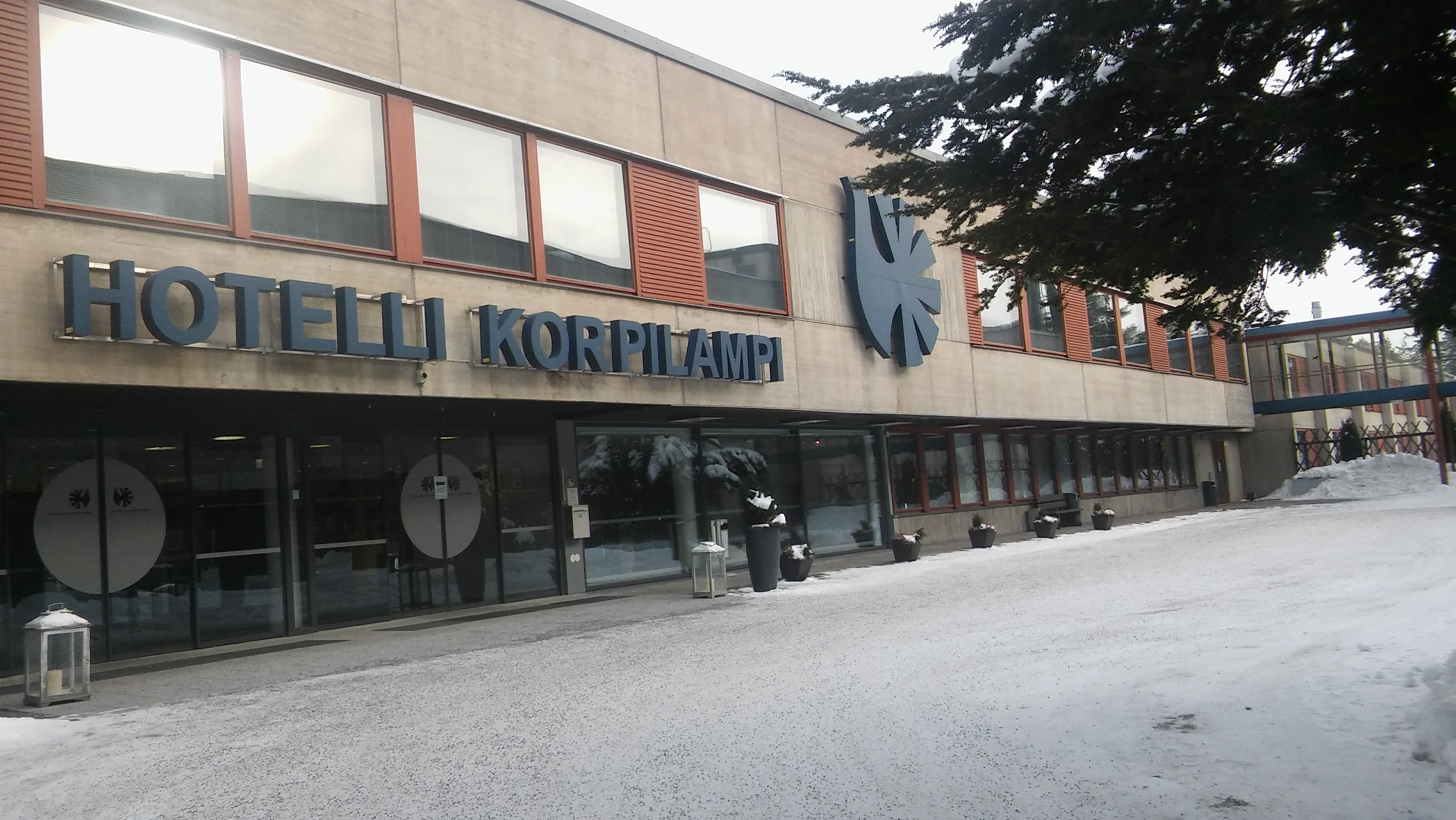 Korpilammen pääovet